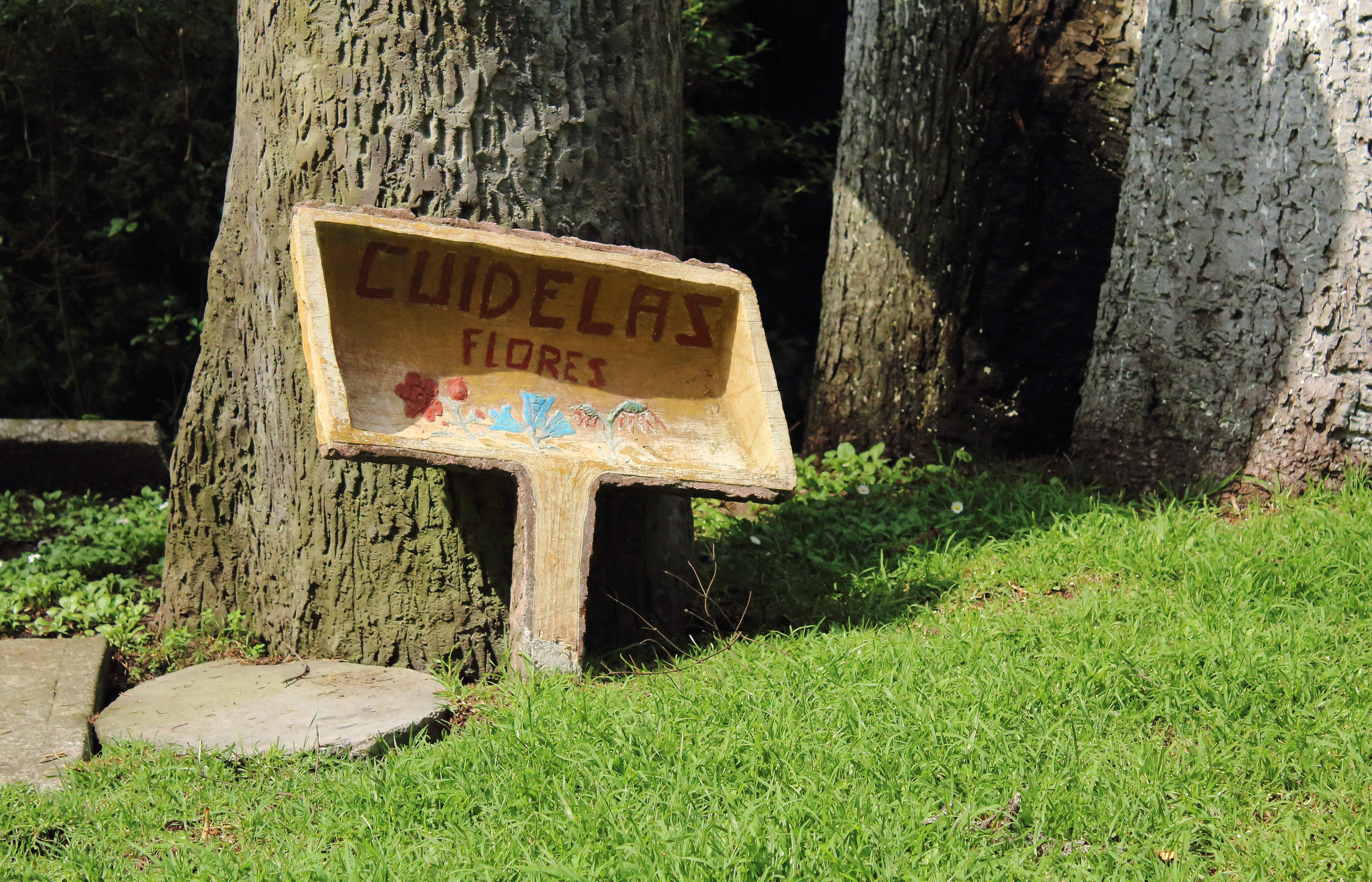 Anuncio en restaurante de Toluca.